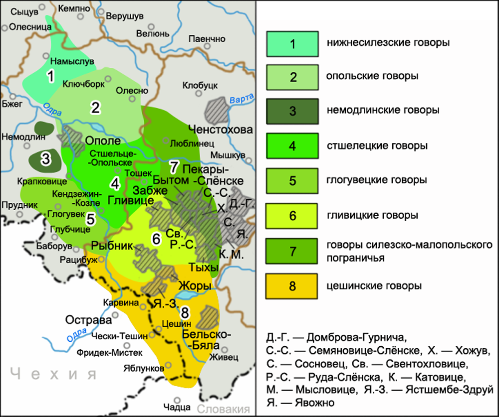 Карта распространения силезских говоров согласно исследованиям С. Бонка.